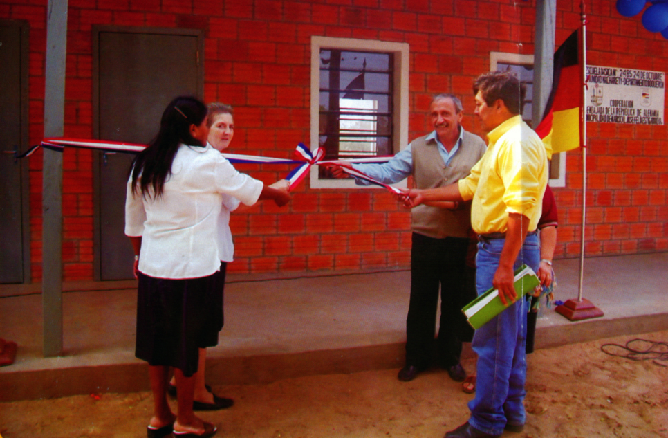 boqueron1